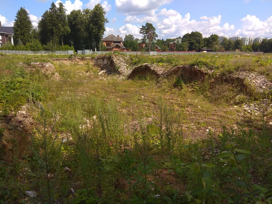 Ландшафт в усадьбе Опалиха-Алексеевское